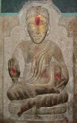 madurai sri prasanna venkatesha perumal temple